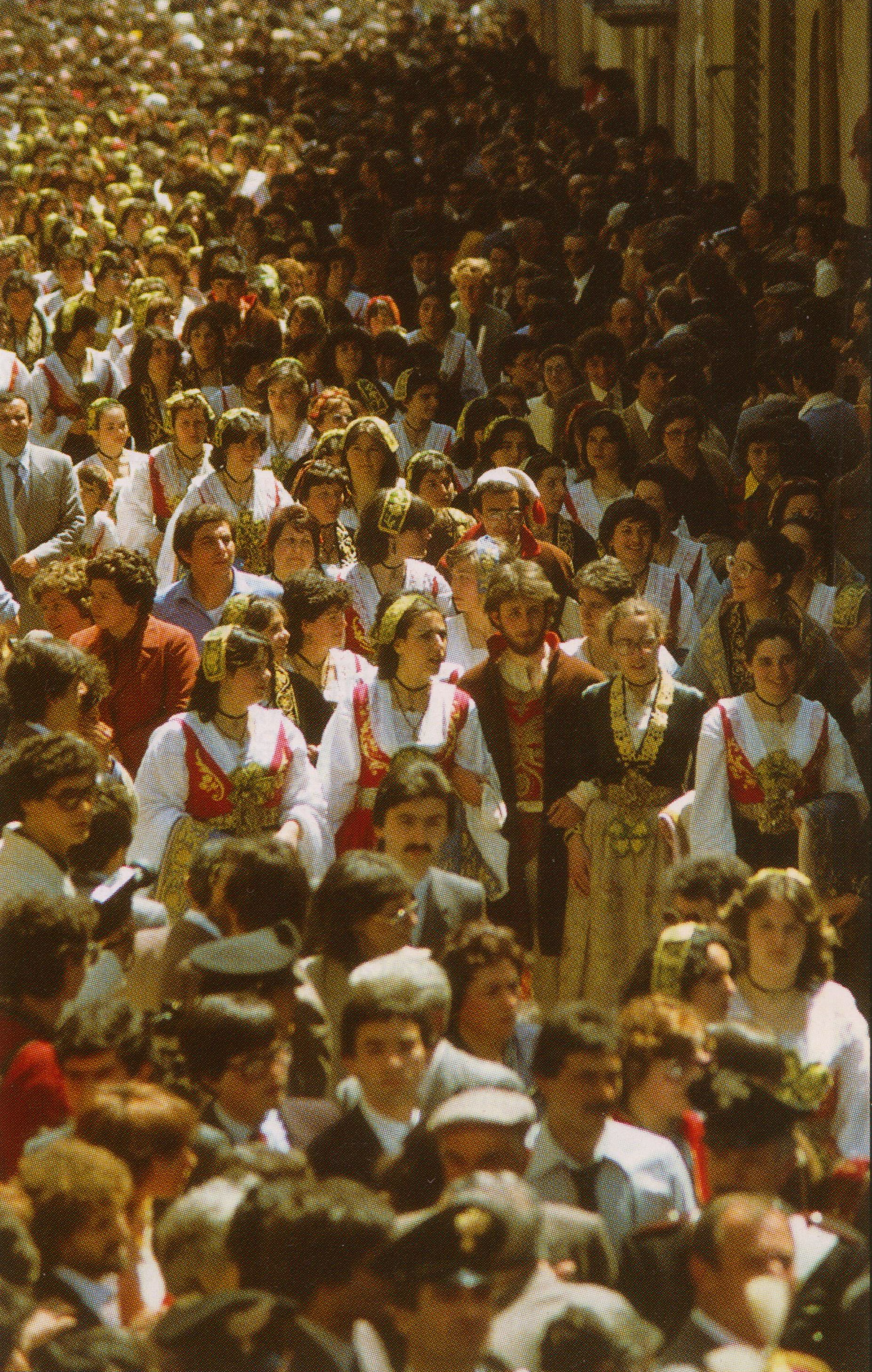 Pasqua a Piana degli Albanesi, anni '90. Corteo nei ricchi costumi albanesi.